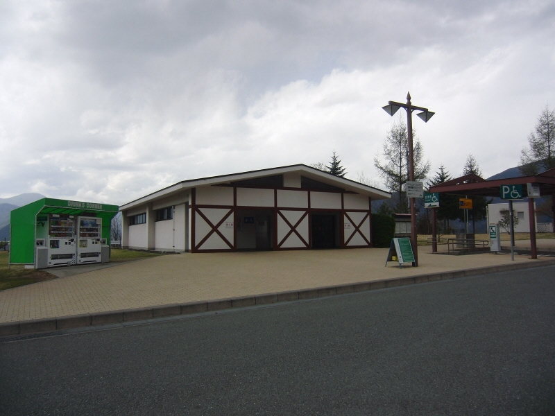 千曲川さかきパーキングエリア下り線の写真です。